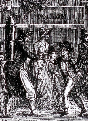 Un marchand de coco parisien, détail d'une gravure ornant Le Caveau moderne, ou le Rocher de Cancalle, Recueil composé des chansons de l'Épicurien Français, ou Dîners du Caveau Moderne,... Huitième volume, orné de musique. A Paris, au Bureau du Journal de l'Épicurien Français, chez Poulet, Imprimeur-Libraire, 1814.